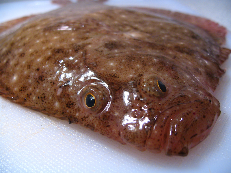 Turbot de sable, vu du dessus et de face (côté gauche pigmenté). Photo prise par Matthieu Godbout, aux Îles-de-la-Madeleine, à l'automne 2006.